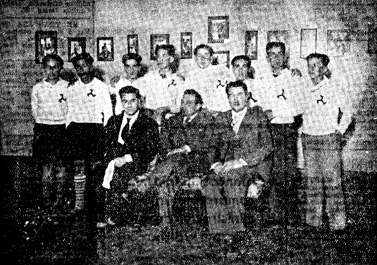 Manuel Lesteiro, Álvaro de las Casas y Filgueira Valverde, con los ultreyas de Vigo, Orense, Villagarcía y Noya en Pontevedra.